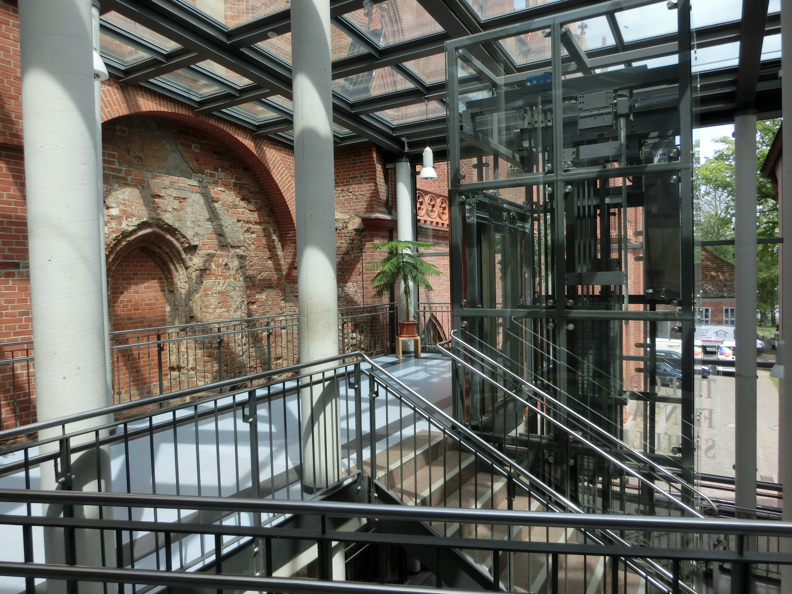 Treppenhaus im Haupteingang des Klausurgebäudes vom Kloster Dobbertin